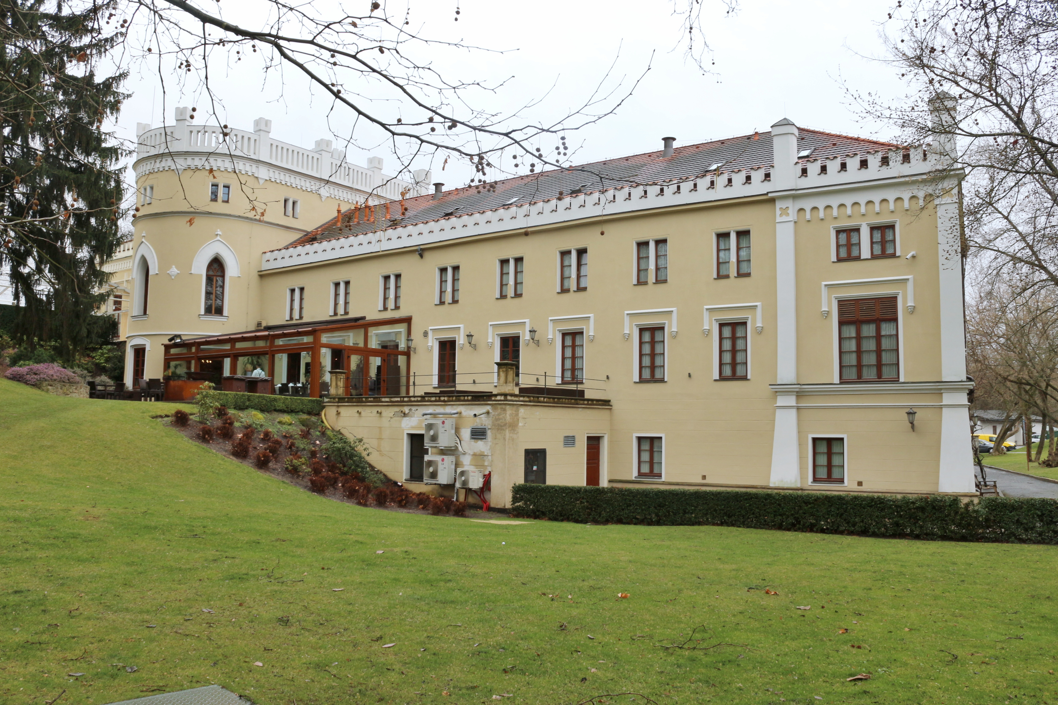 Krčský zámek sv. Havel